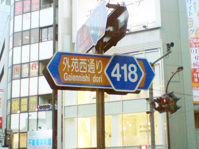 外苑西通り